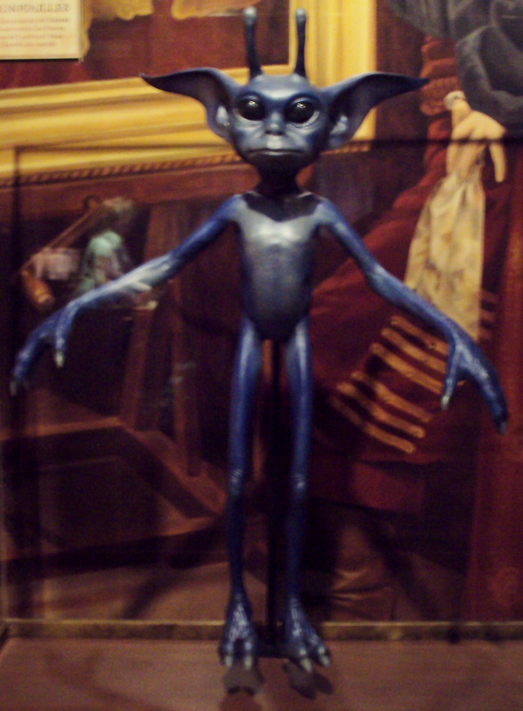 Keltisch Aardmannetje (Engels: Cornish pixie) tijdens Harry Potter: The Exhibition in Brussel (België)